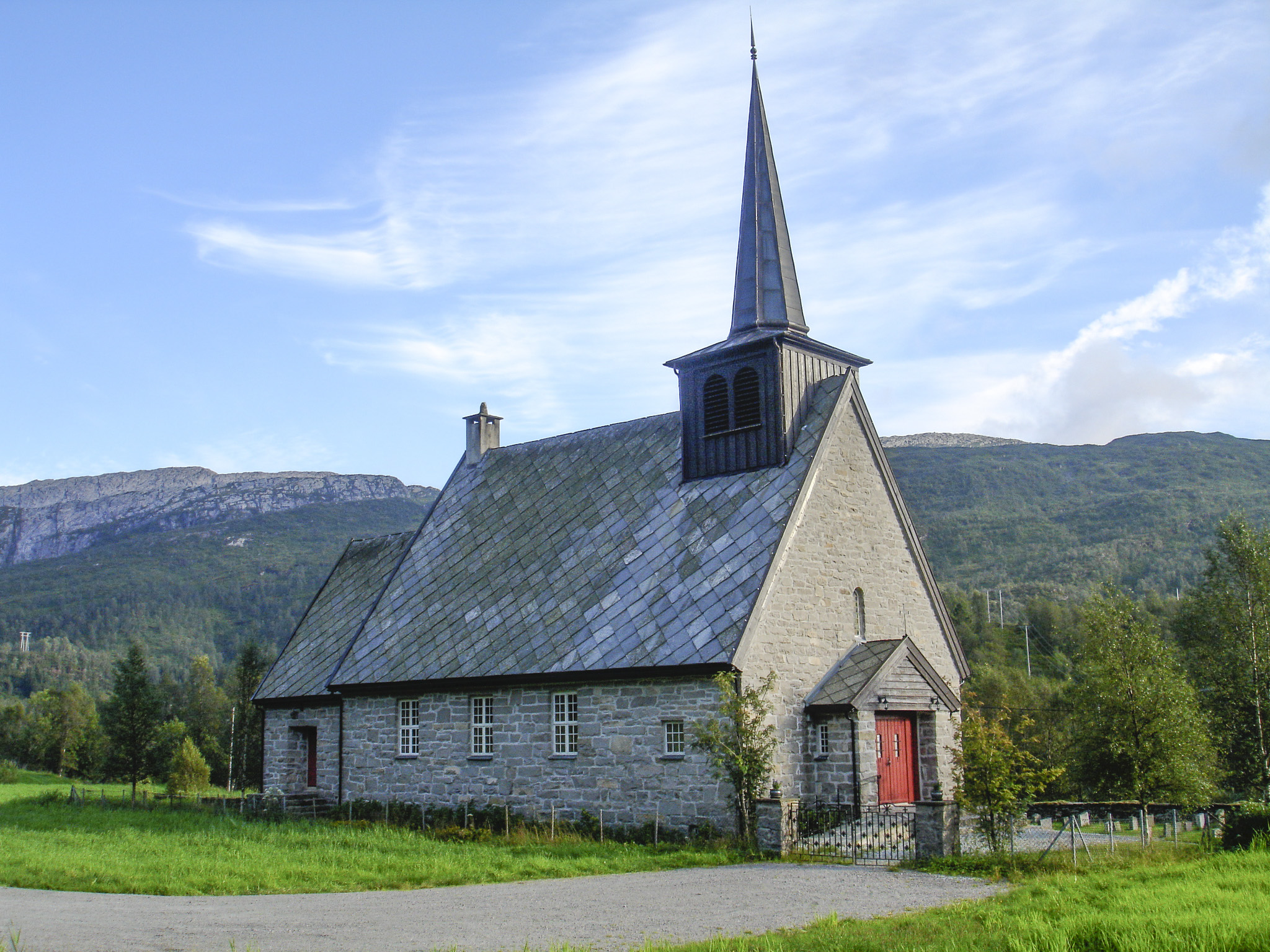 Bilde av Bergsdalen kirke Norsk (nynorsk): Bergsdalen kyrkje